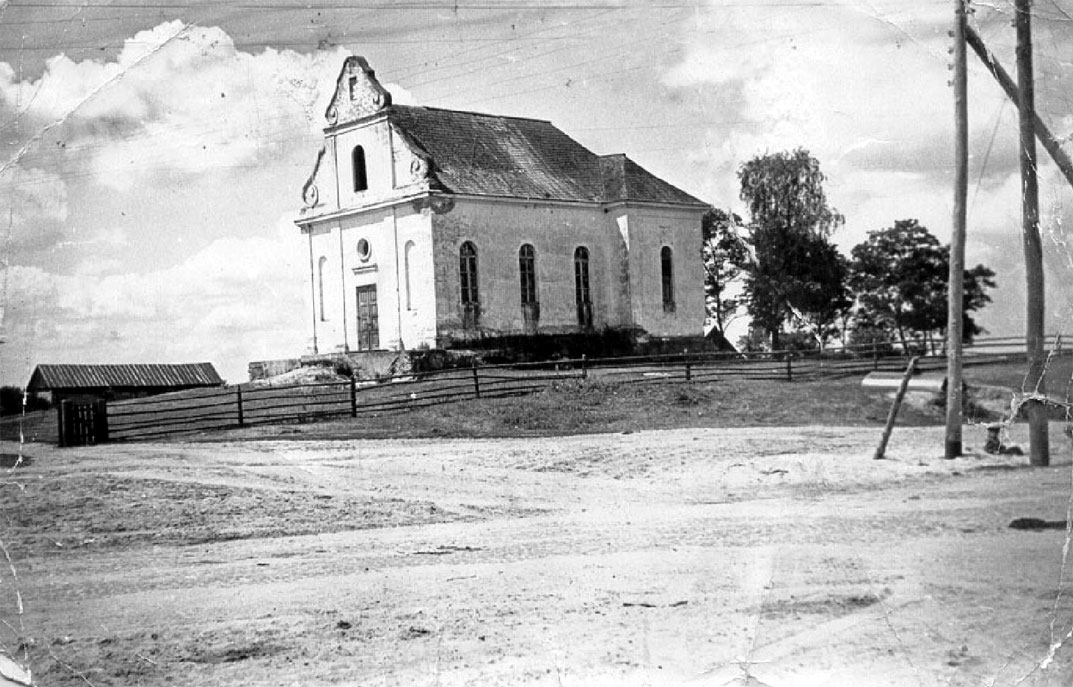 Беларуская (тарашкевіца): Лунін (Łunin). Касьцёл